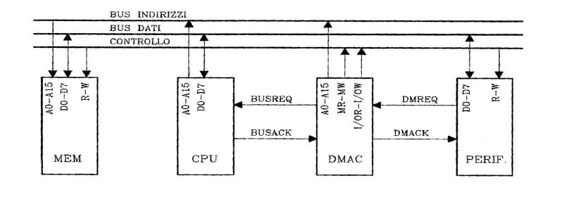 SistemaDMAC